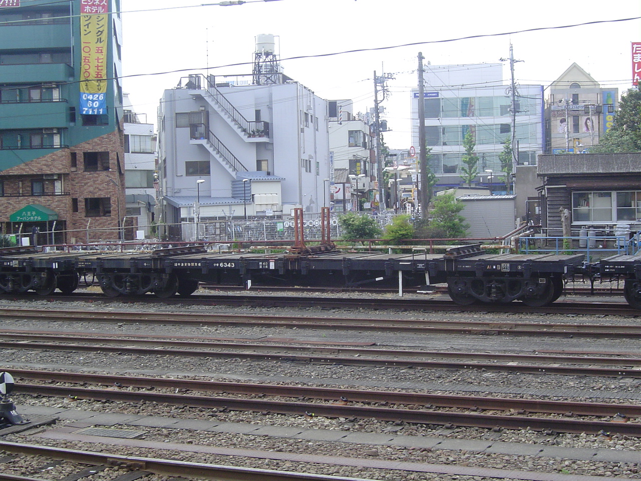 JR東日本チキ6000形長物車（チキ6342）。レール運搬用の事業用車。八王子駅で撮影。